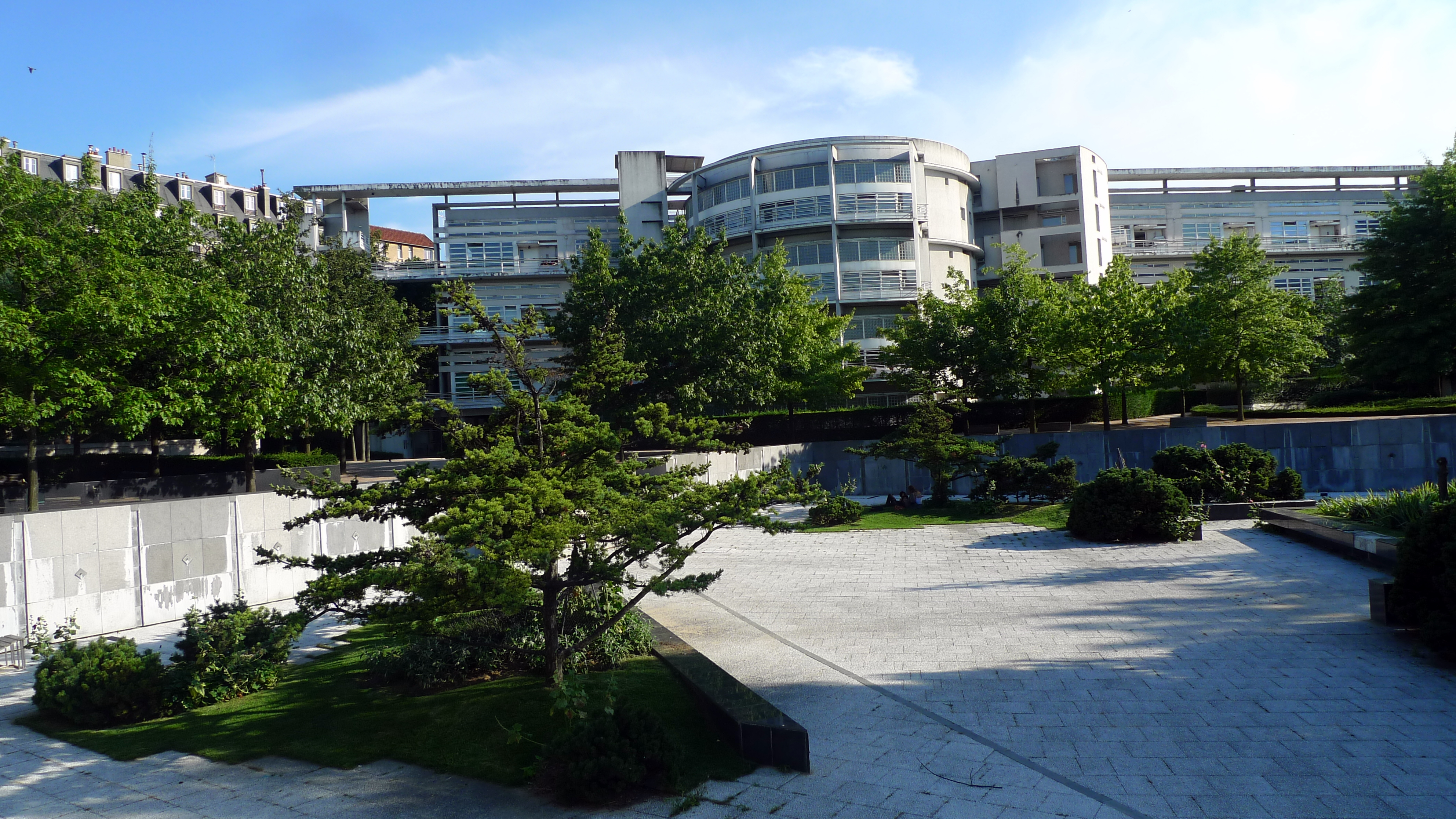 jardin André Citroën (PARIS,FR75)